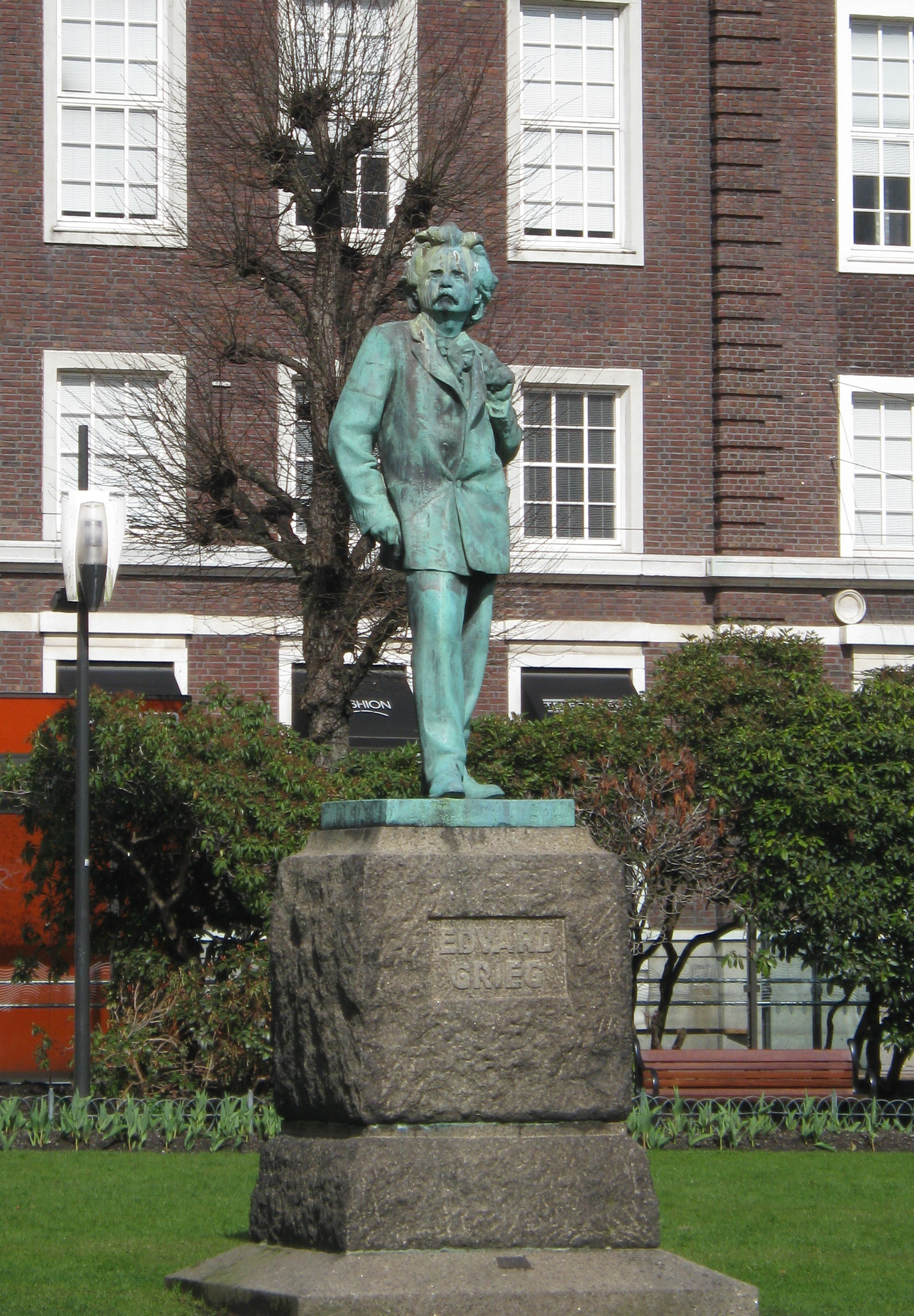 Statue av Edvard Grieg, plassert ved Festpaviljongen i Bergen, mellom Festplassen og Ole Bulls plass. Kunster er Ingebrigt Vik.